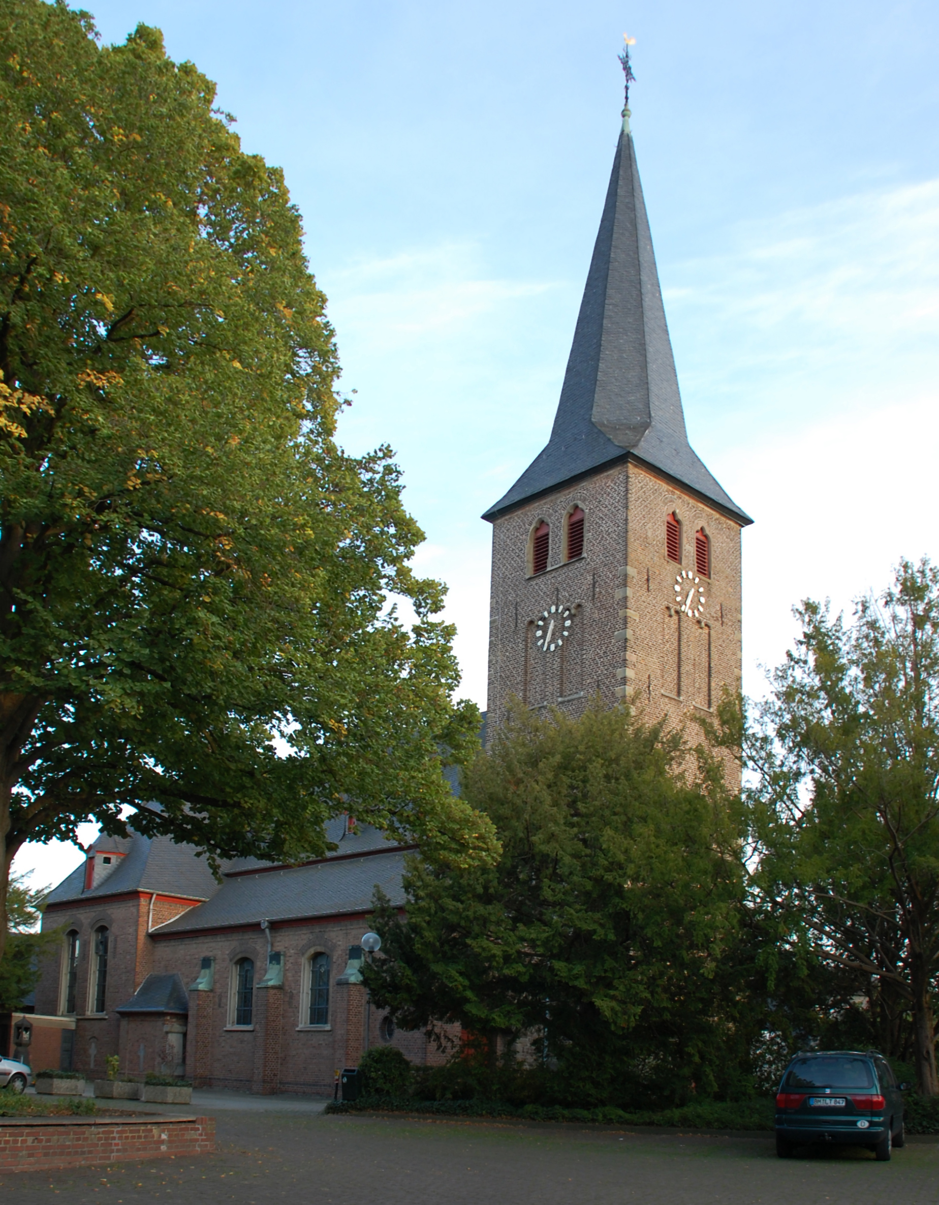 St. Kunibert in Blatzheim, Kerpen This is the photograph of an architectural monument. It is part of the list of cultural monuments of Frechen-Blatzheim, no. 54